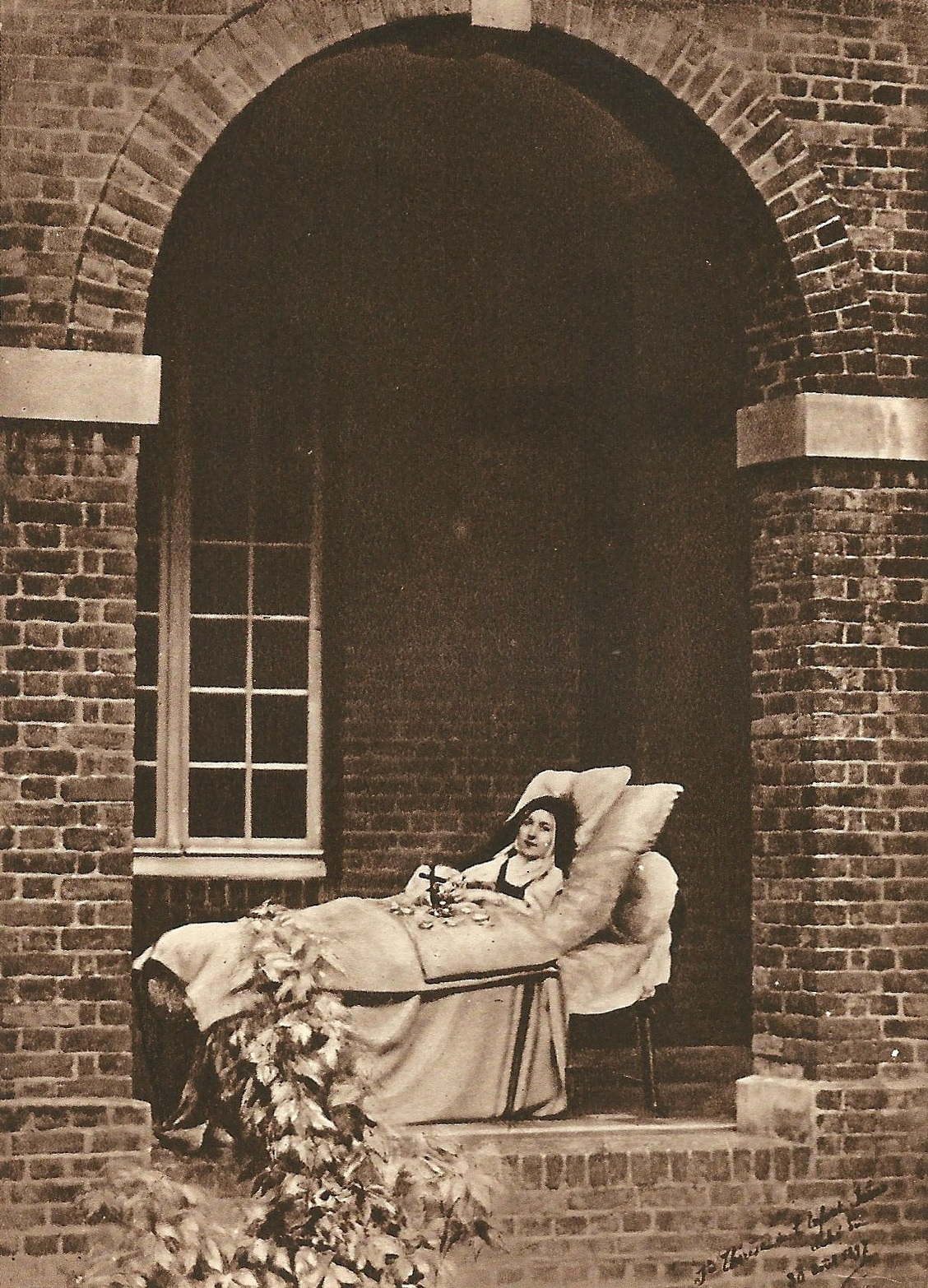 Gravure de Sainte Thérèse de l'Enfant Jésus, Histoire d'une âme écrite par elle-même, Lisieux, Office central de Lisieux (Calvados), & Bar-le-Duc, Imprimerie Saint-Paul, 1937, édition 1940. « Thérèse effeuillant des roses sur son crucifix. Photographie prise dans le cloître, à la porte de l'infirmerie, le 30 août 1896 ».